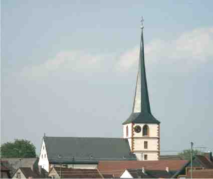 Kirche St.-Georg in Baldersheim